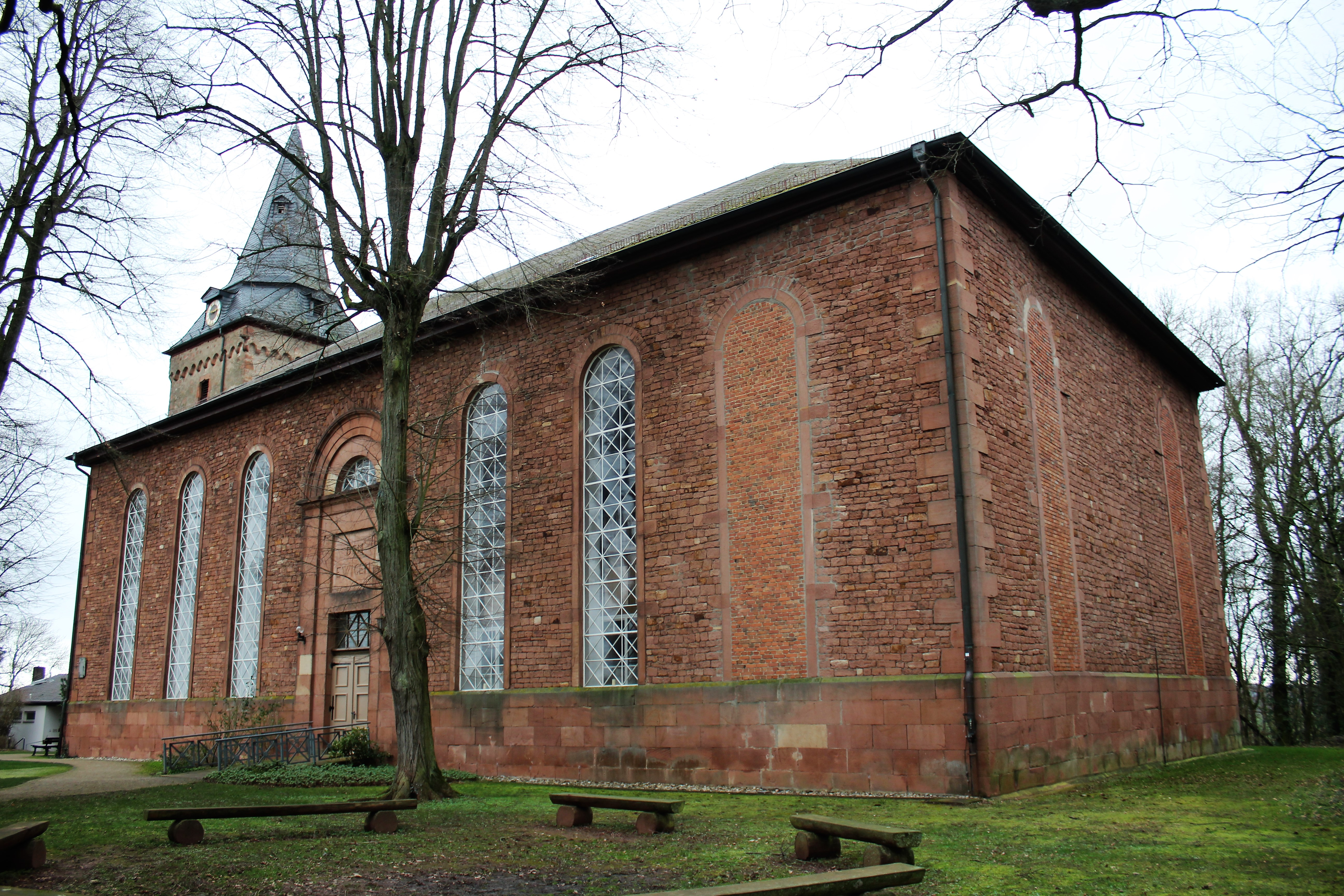 Evangelische Kirche Niedergründau, Gemeinde Gründau, Main-Kinzig-Kreis, Hessen, Deutschland